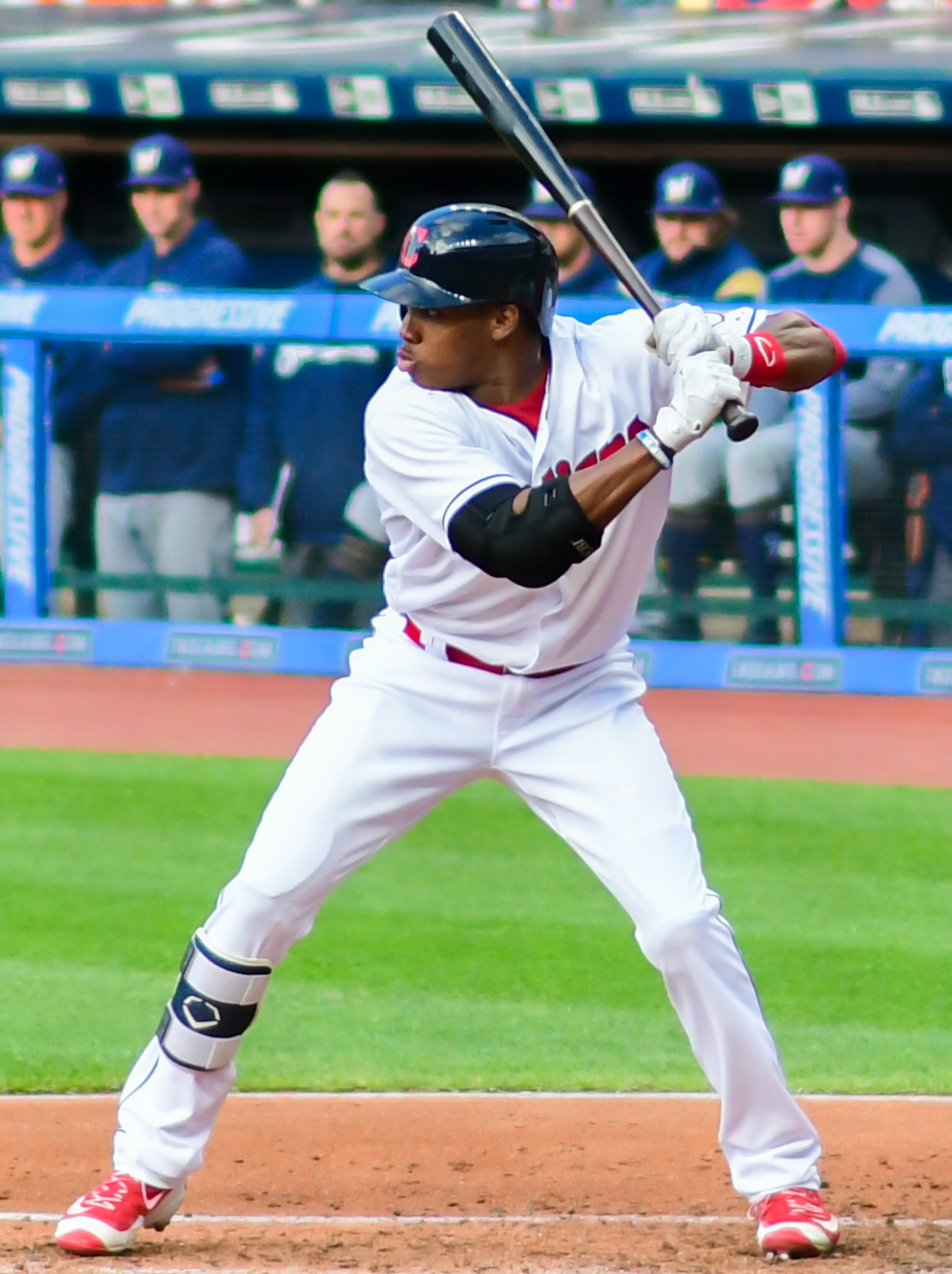 Greg Allen